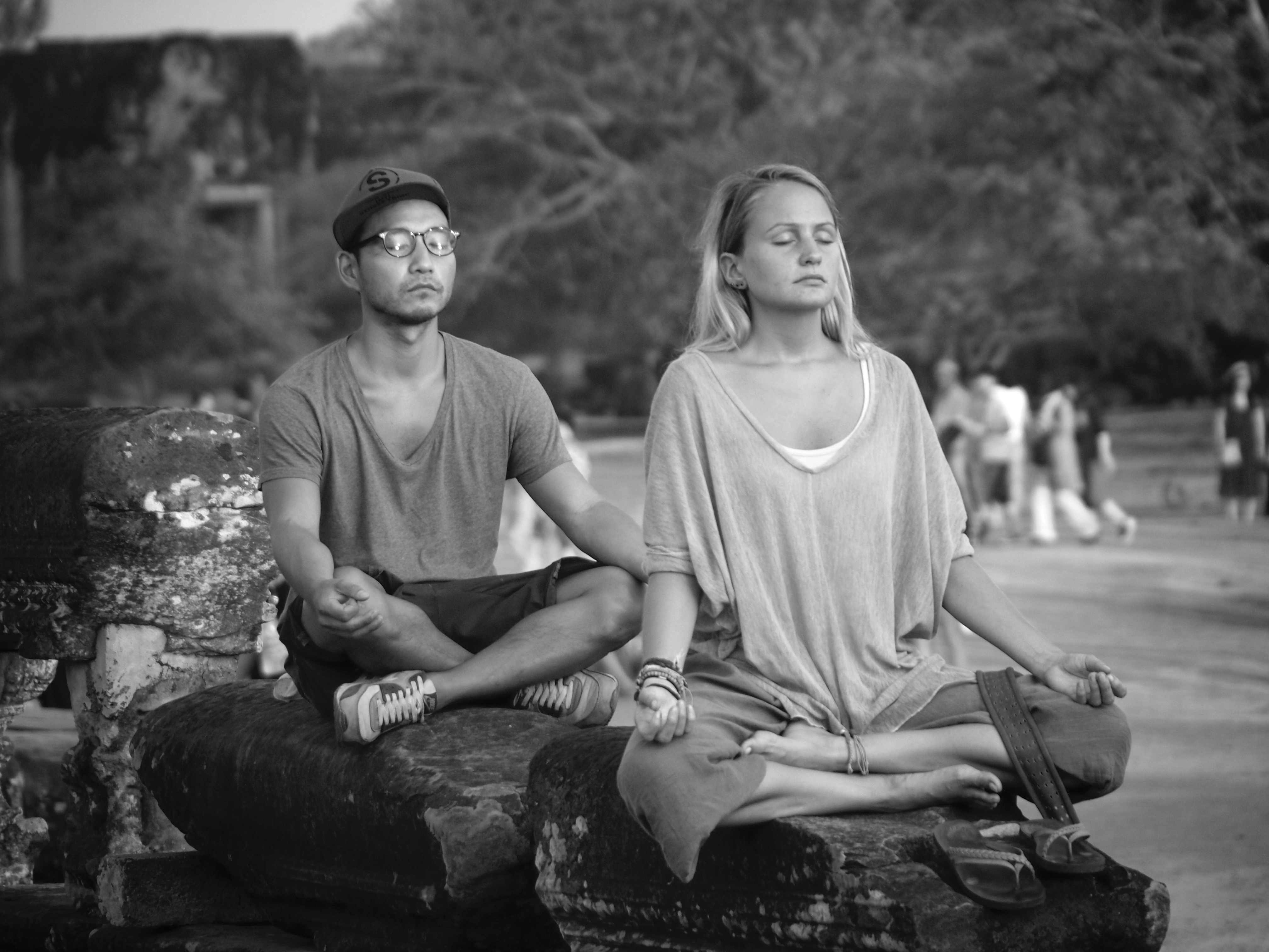 Meditating in Angkor Wat